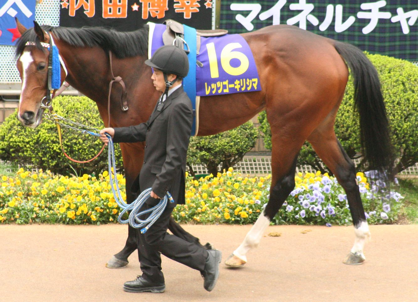 レッツゴーキリシマ（中山競馬場 第68回皐月賞）